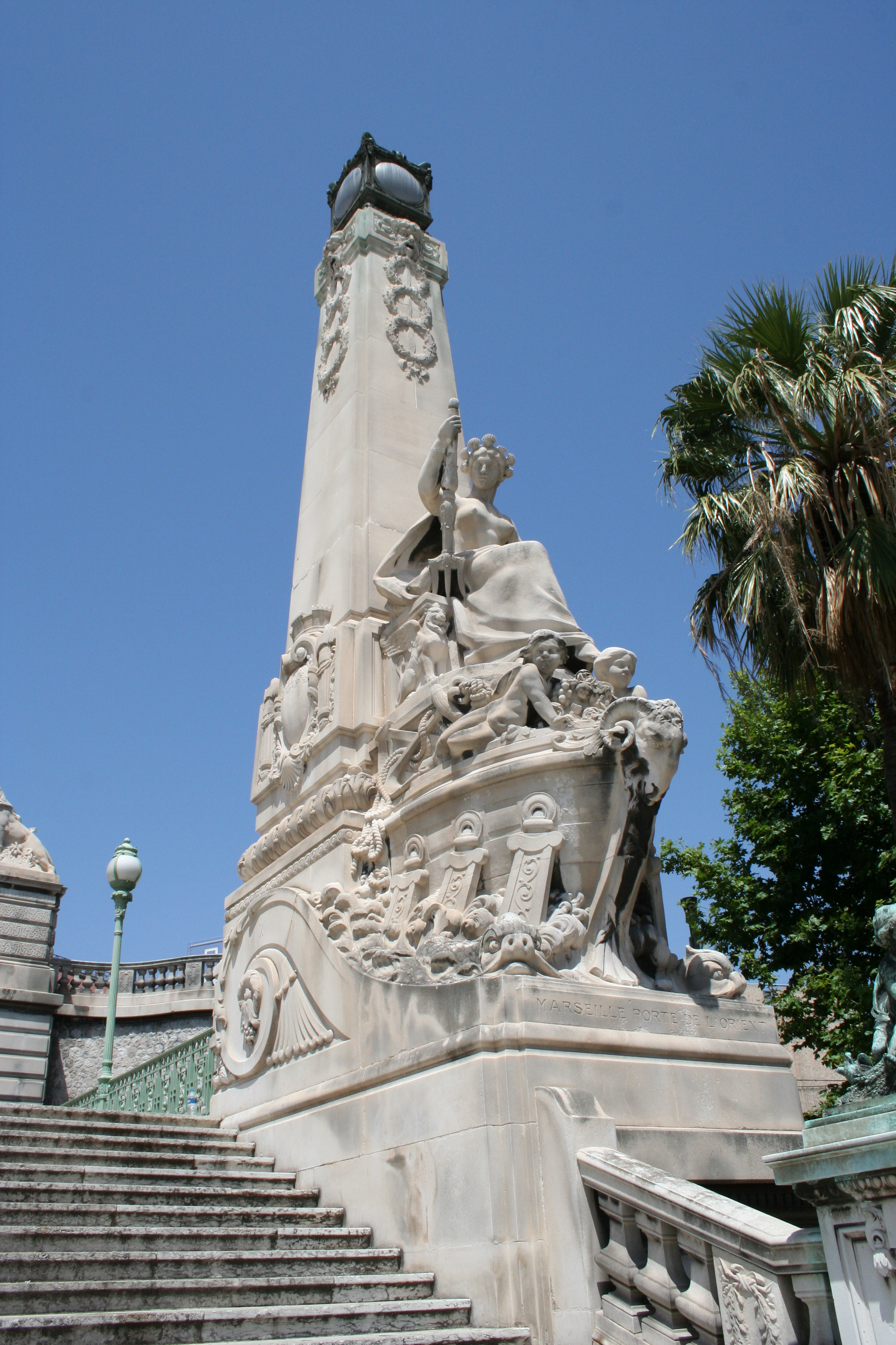 Pylône de l'escalier monumental de la gare Saint Charles à Marseille, sculpté par Auguste Carli (1868-1930)